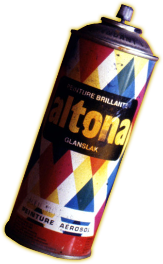 Immagine ritagliata e modificata dall'originale su commons